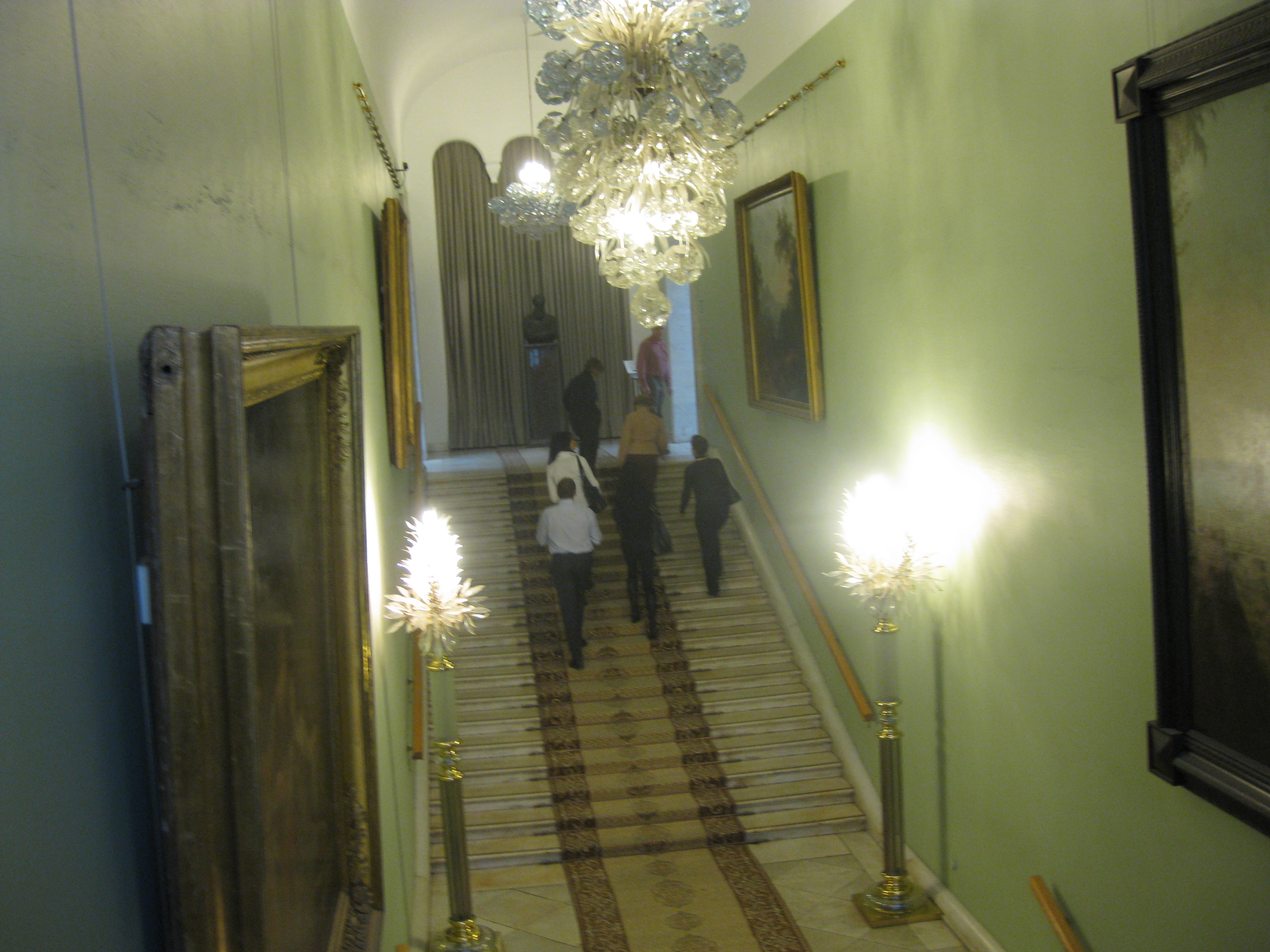 State Tretyakov Gallery גלריית טרטייקוב